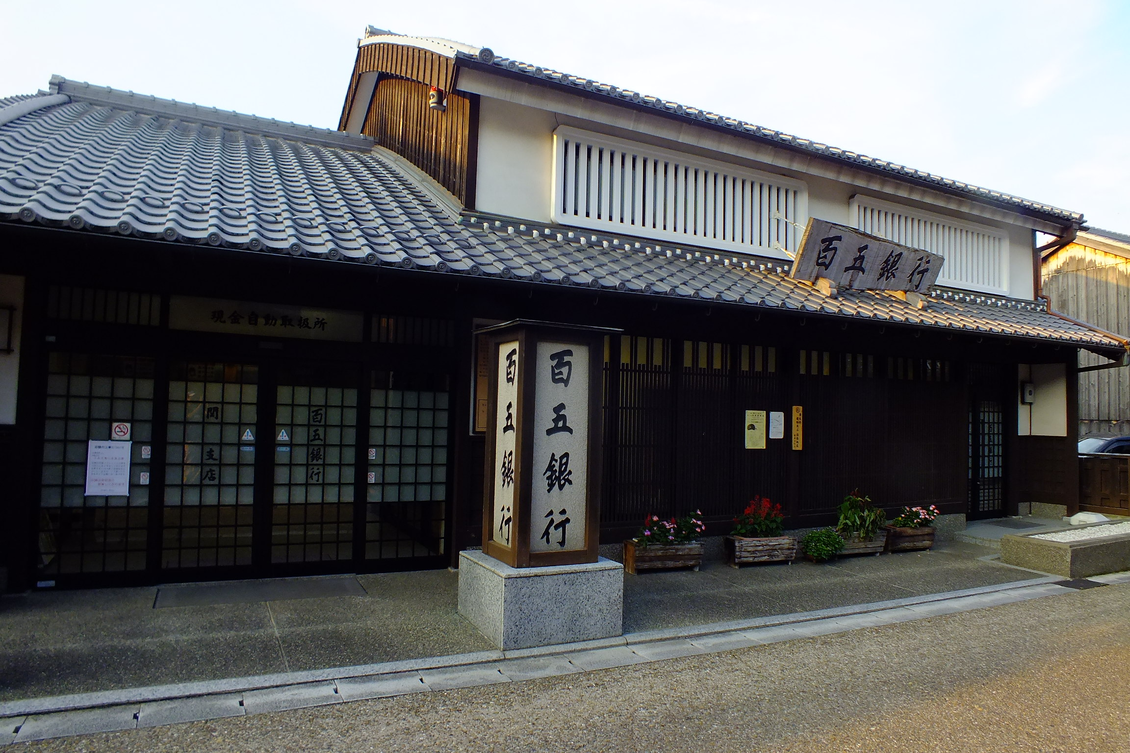 2016-08-05 Tokaido Seki Juku Kameyama City Mie,東海道五十三次 関宿